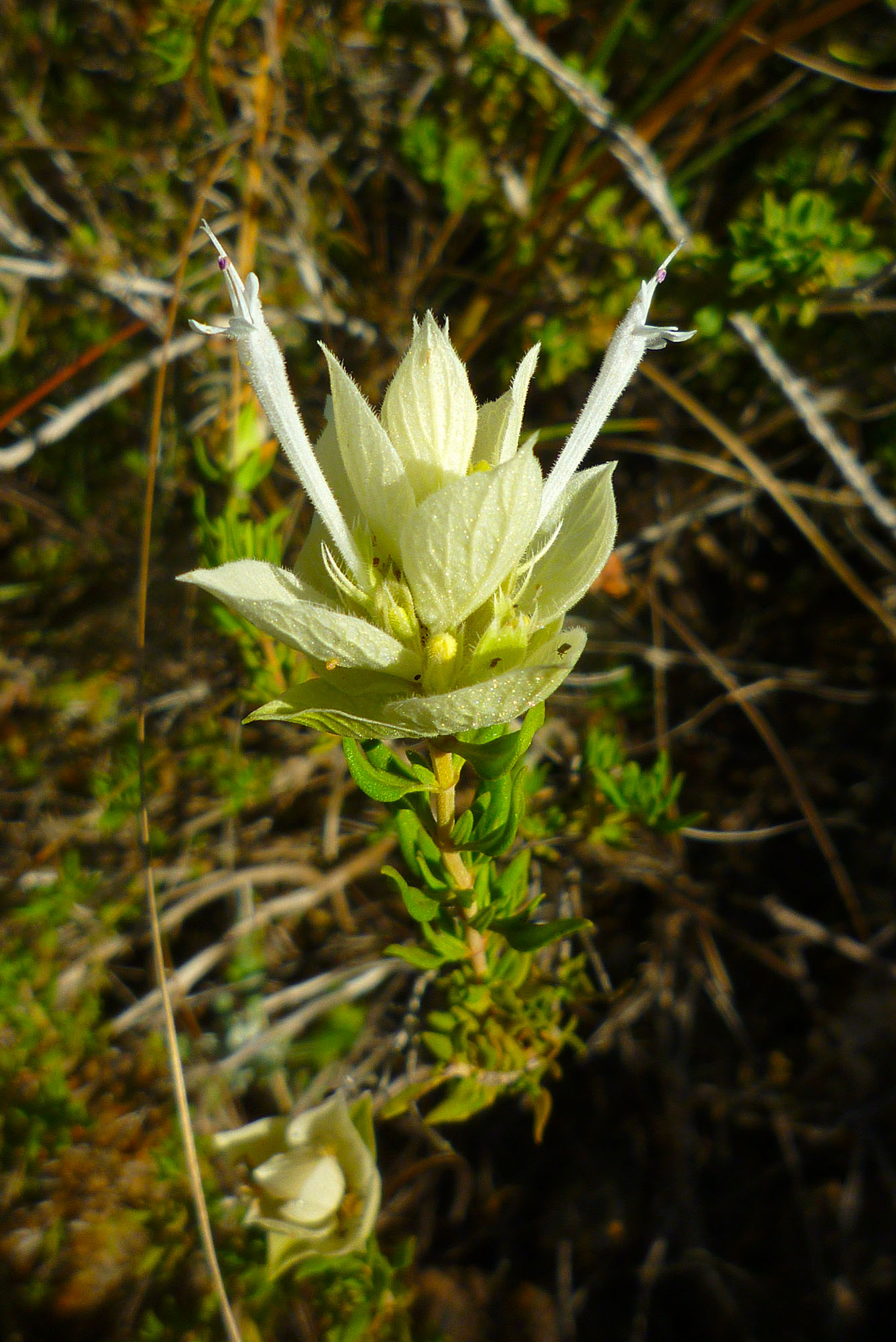 Thymus membranaceus en las sierras de Cartagena, España. Endemismo del sureste Ibérico.